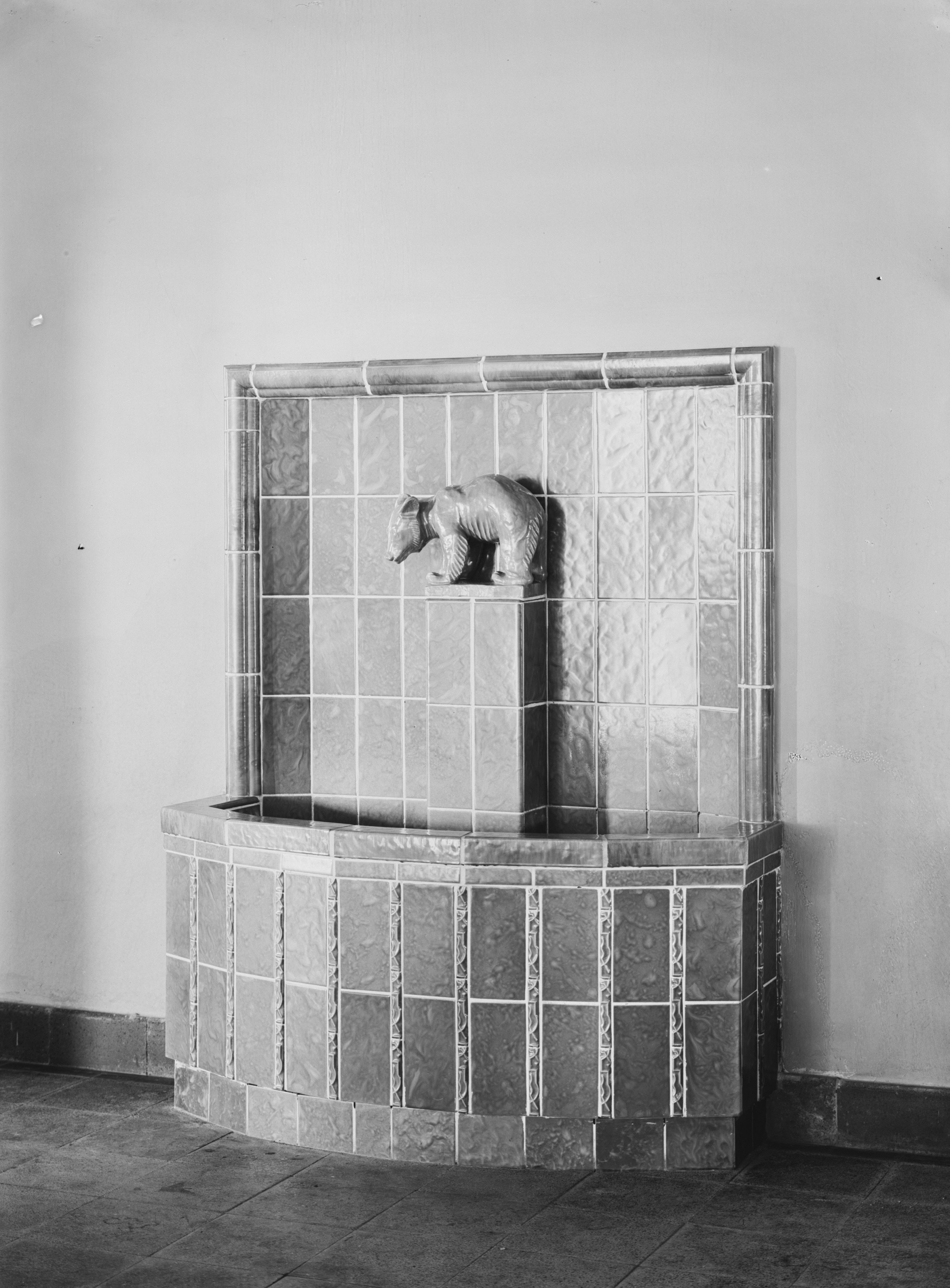 Schule Langenhorn [Heute: Fritz-Schumacher-Schule] (Hamburg-Langenhorn): Brunnen mit Tierplastik SchumacherWV Nr. 294